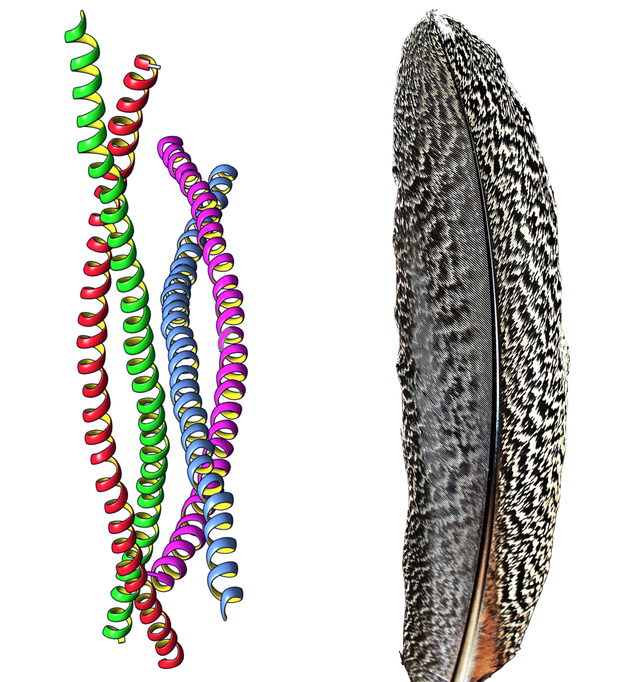 Alfa-queratina humana (PDB: 4ZRY) y una pluma. Las beta-queratinas son el componente principal de las plumas de las aves.